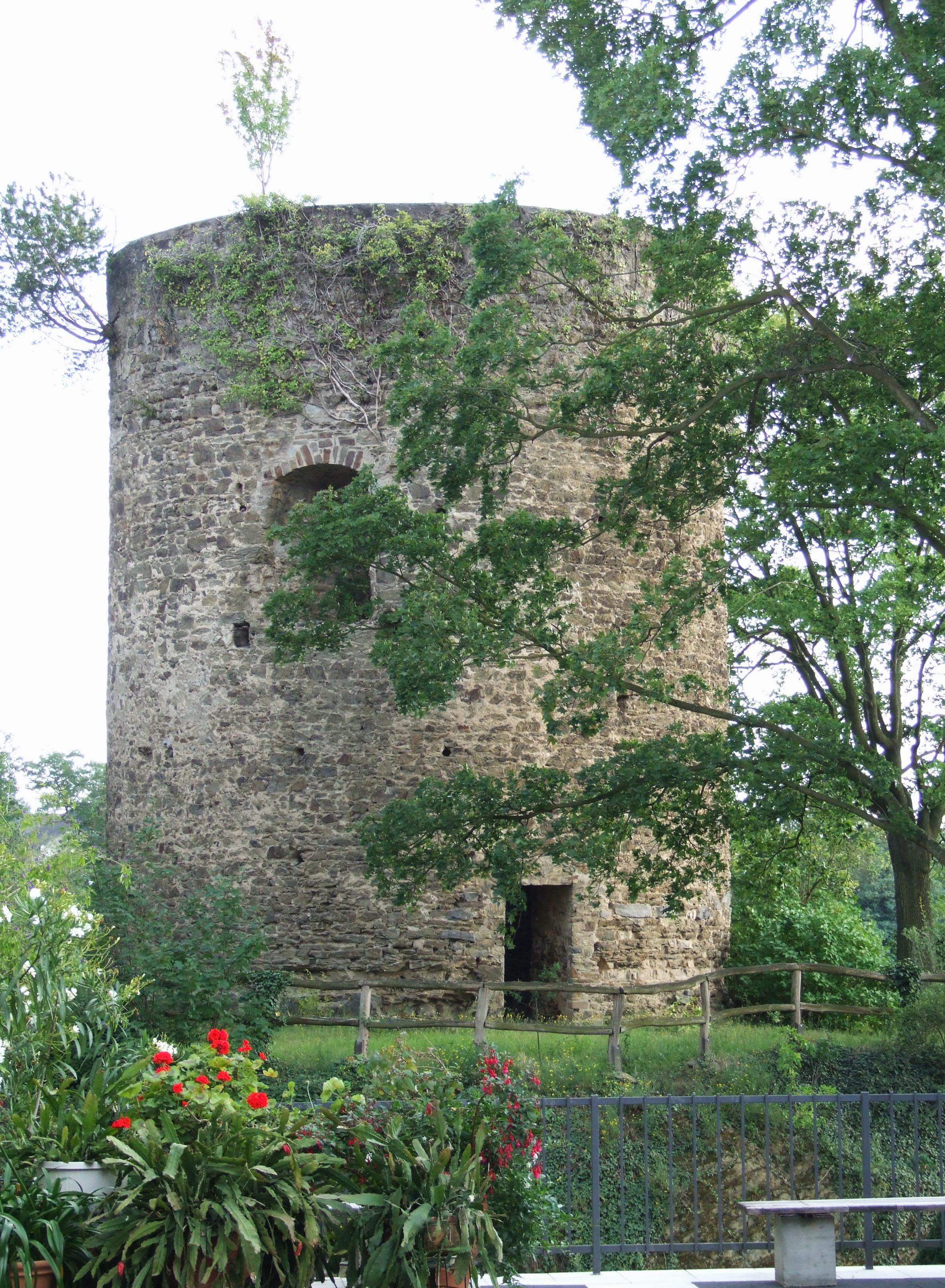 Wohnturm der Burg Dattenberg in Dattenberg